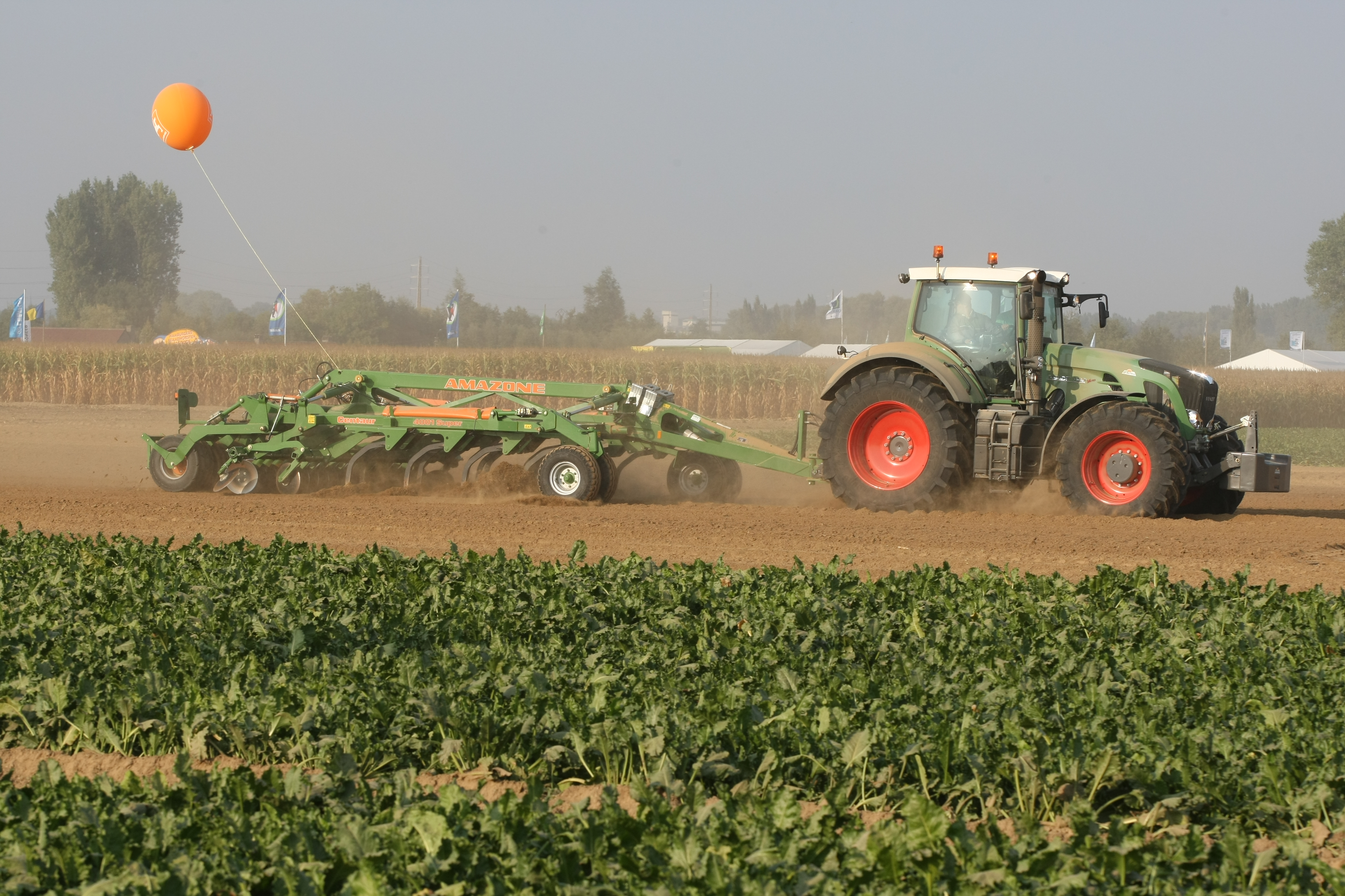 Grubber-Scheibeneggen-Kombination Centaur 4001 Super von Amazone hinter einem Fendt-Traktor 9?? Vario auf den Werktuigendagen 2009 in Belgien